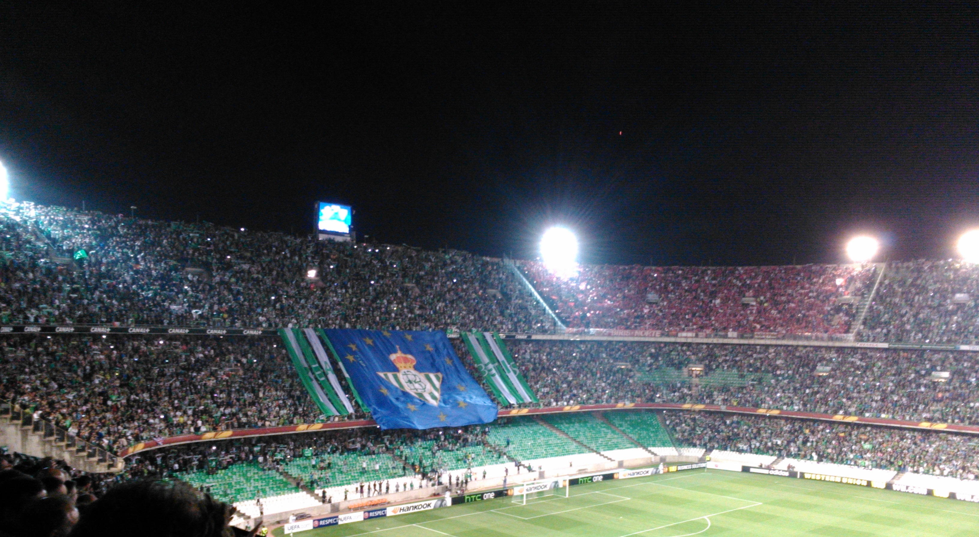 Estadio Benito Villamarin en un derbi europeo